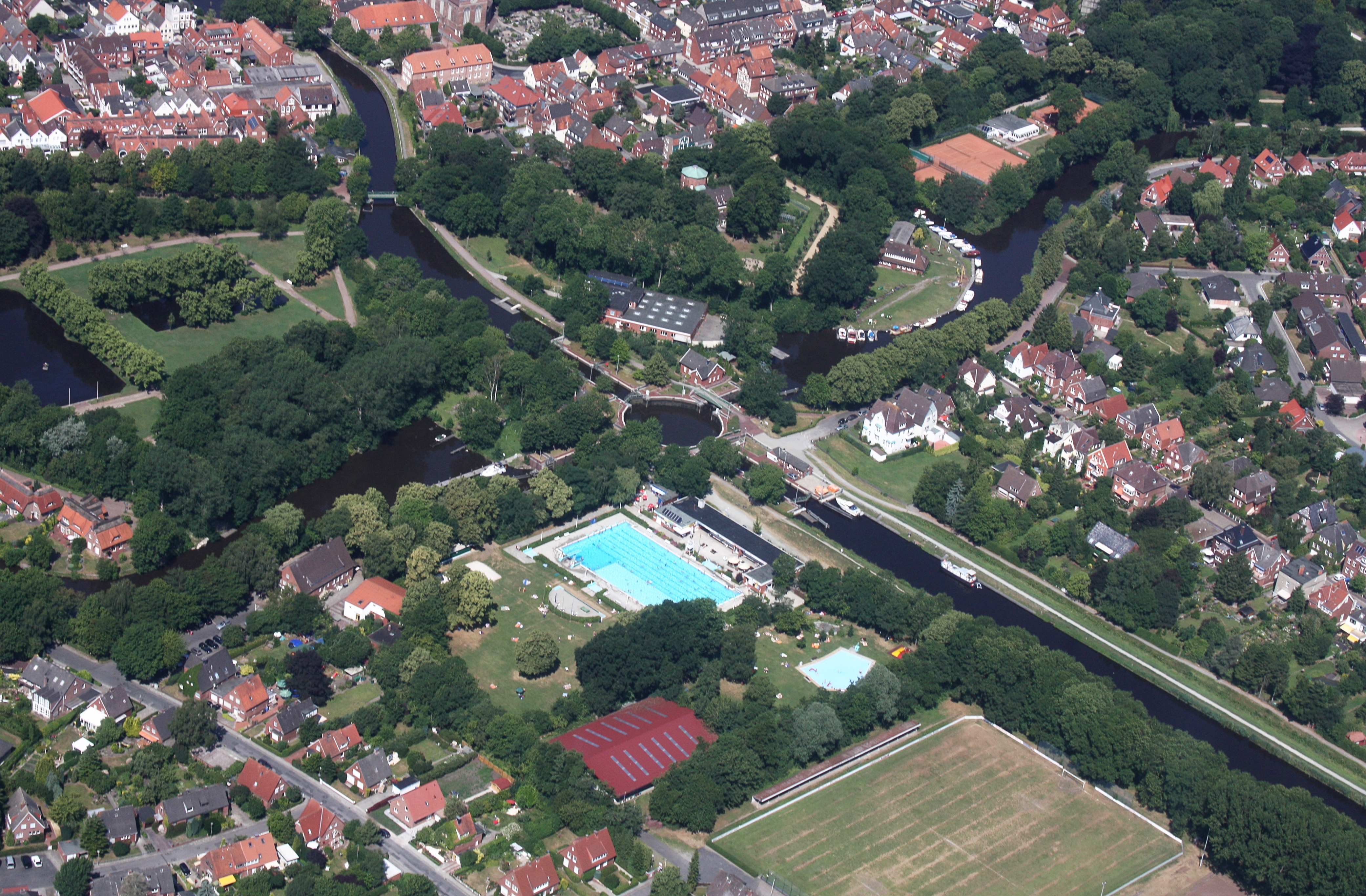 Flug über Emden; Flughöhe 1500 ft; Juli 2010; Originalfoto bearbeitet: Tonwertkorrektur und Bild geschärft mit Hochpassfilter